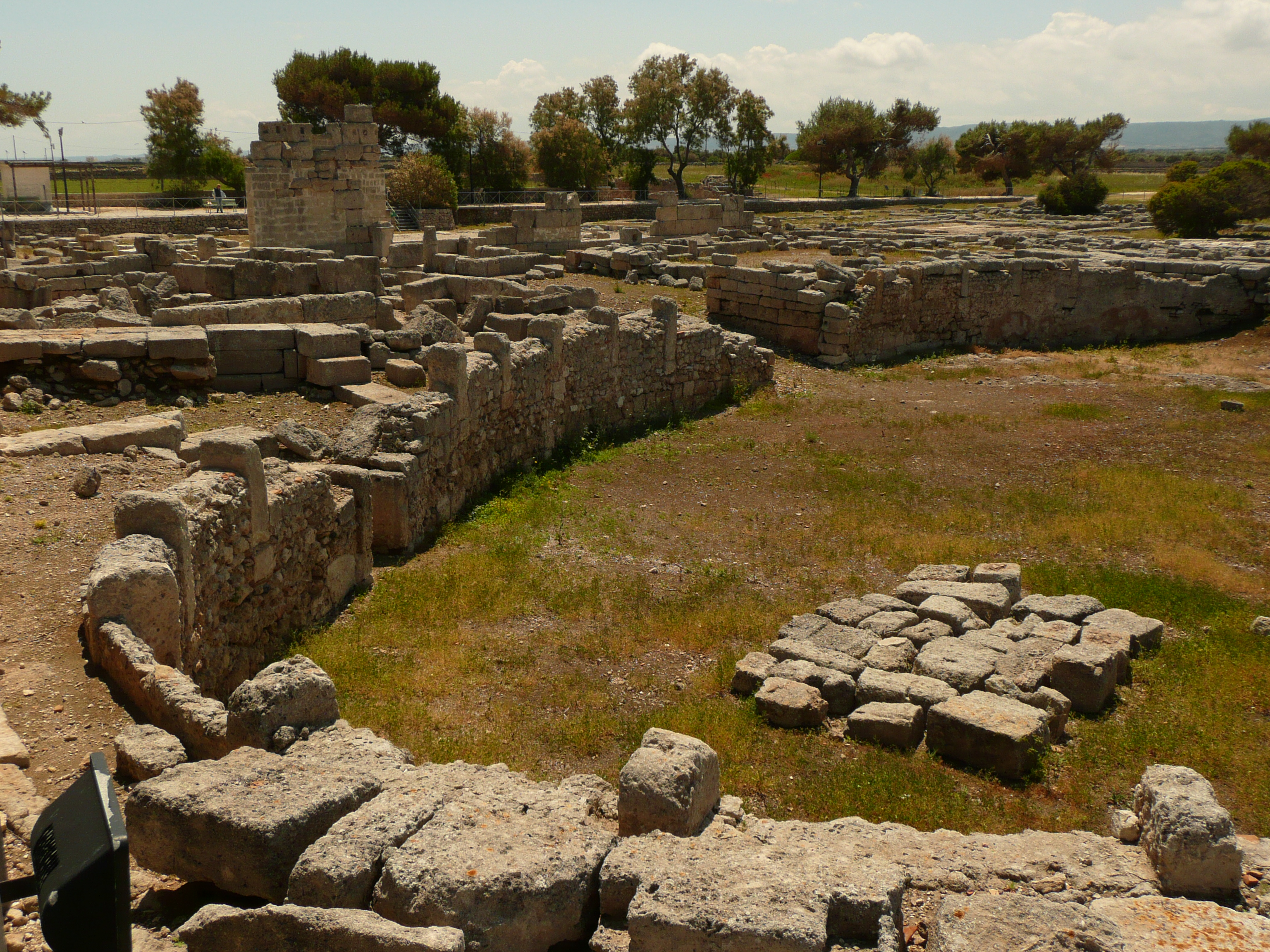 Parque arqueológico de Egnazia, Apulia.